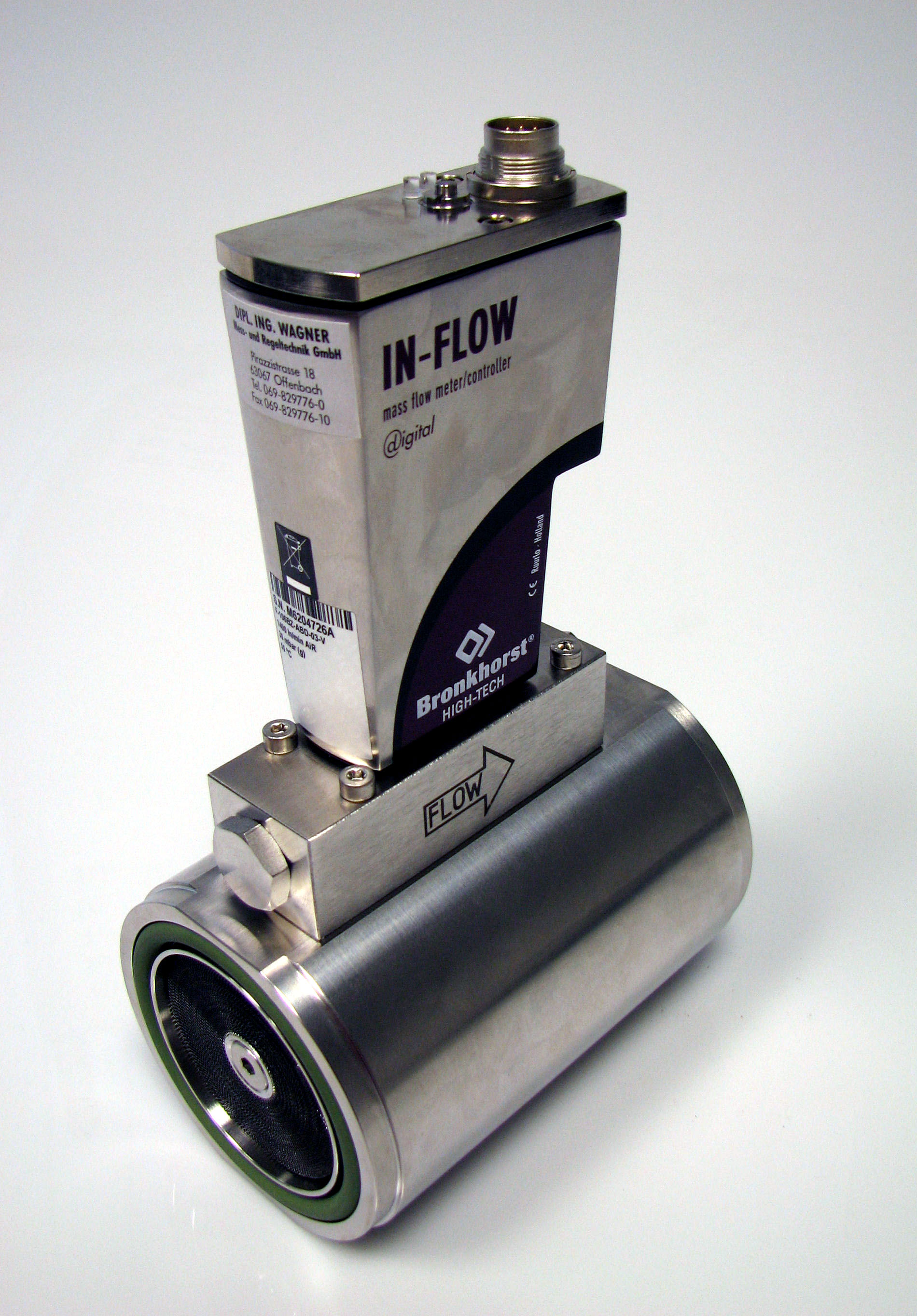 Luftmassenmesser kalibriert für max. 1400 nl/min Mass flow meter for max 1400 nl/min